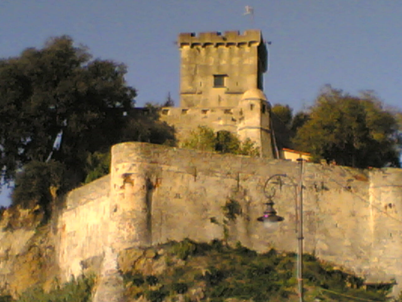 Particolare del Castello di san Terenzo